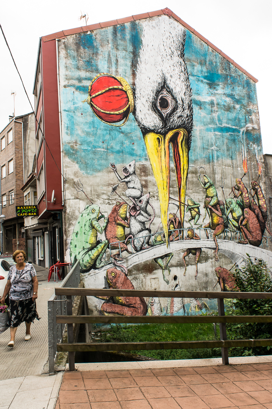 Ericailcane Desordes